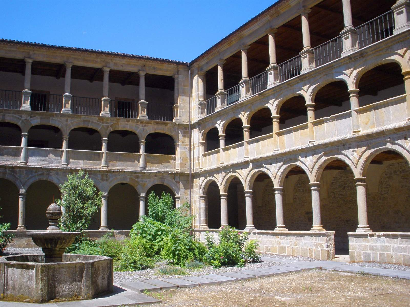 Claustro del Monasterio de Santa María de Valdediós (Puelles, Villaviciosa, Asturias)